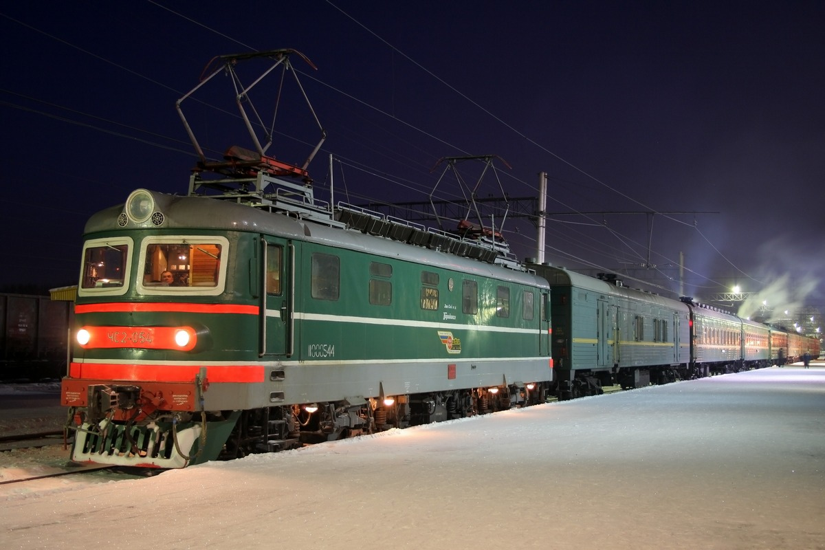 Поезд на станции Томск-I.